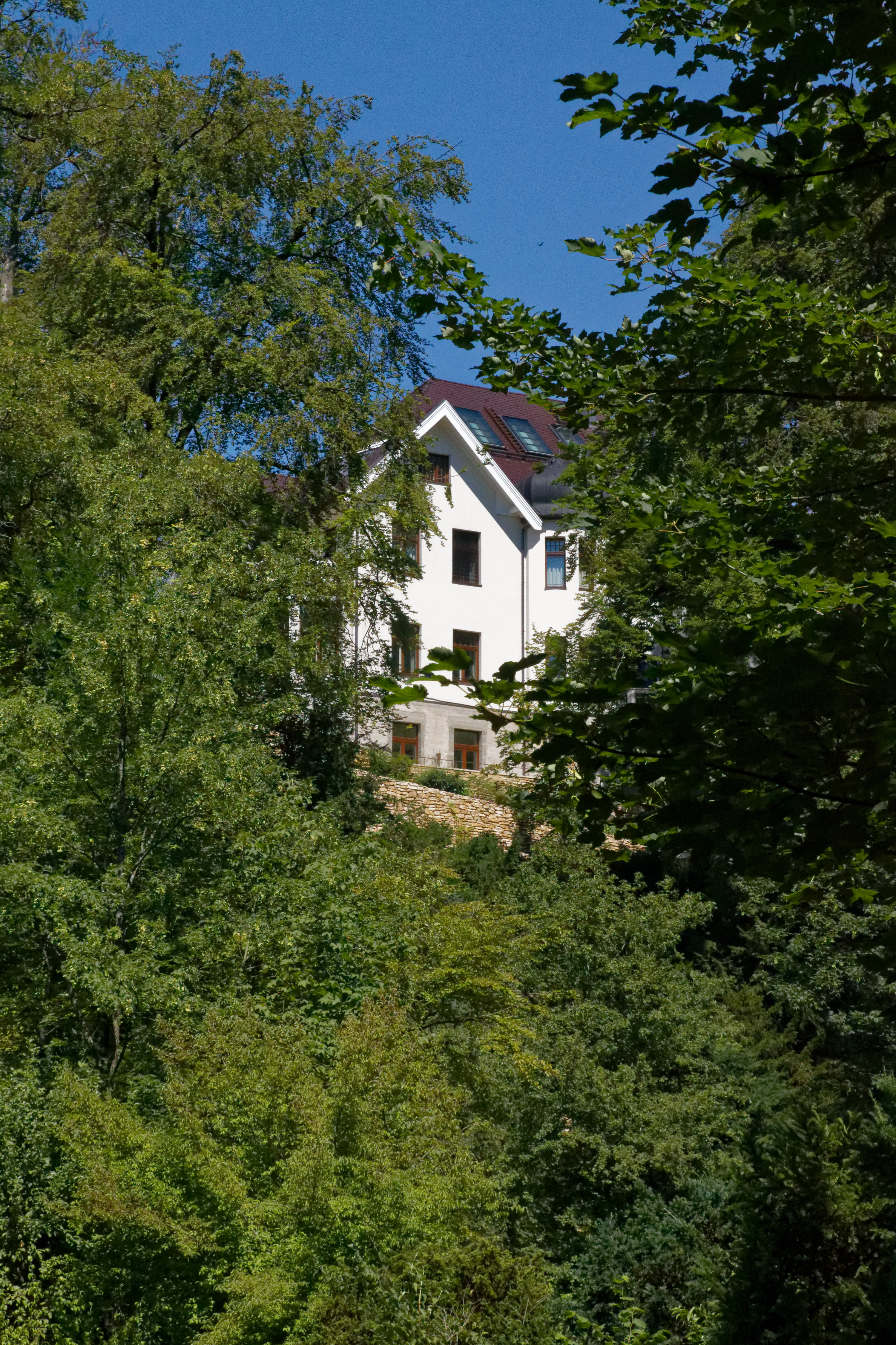 Villa Littmann in der Heilmannstraße 29 in München, gesehen aus dem Tal von der Conwentzstraße aus